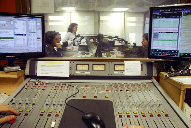 Control técnico y estudio central de Radio Concepto Buenos Aires.